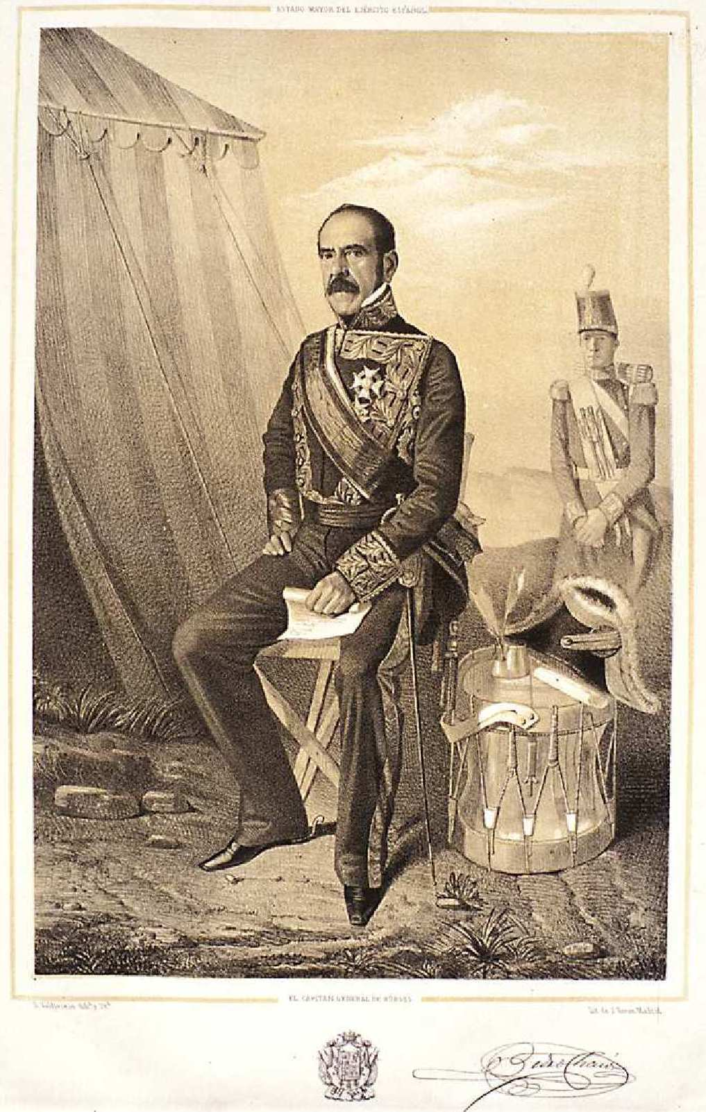 Retrato de Pedro Chacón. 1852. Litografía de Domingo Valdivieso y Henarejos. Biblioteca Nacional de España.